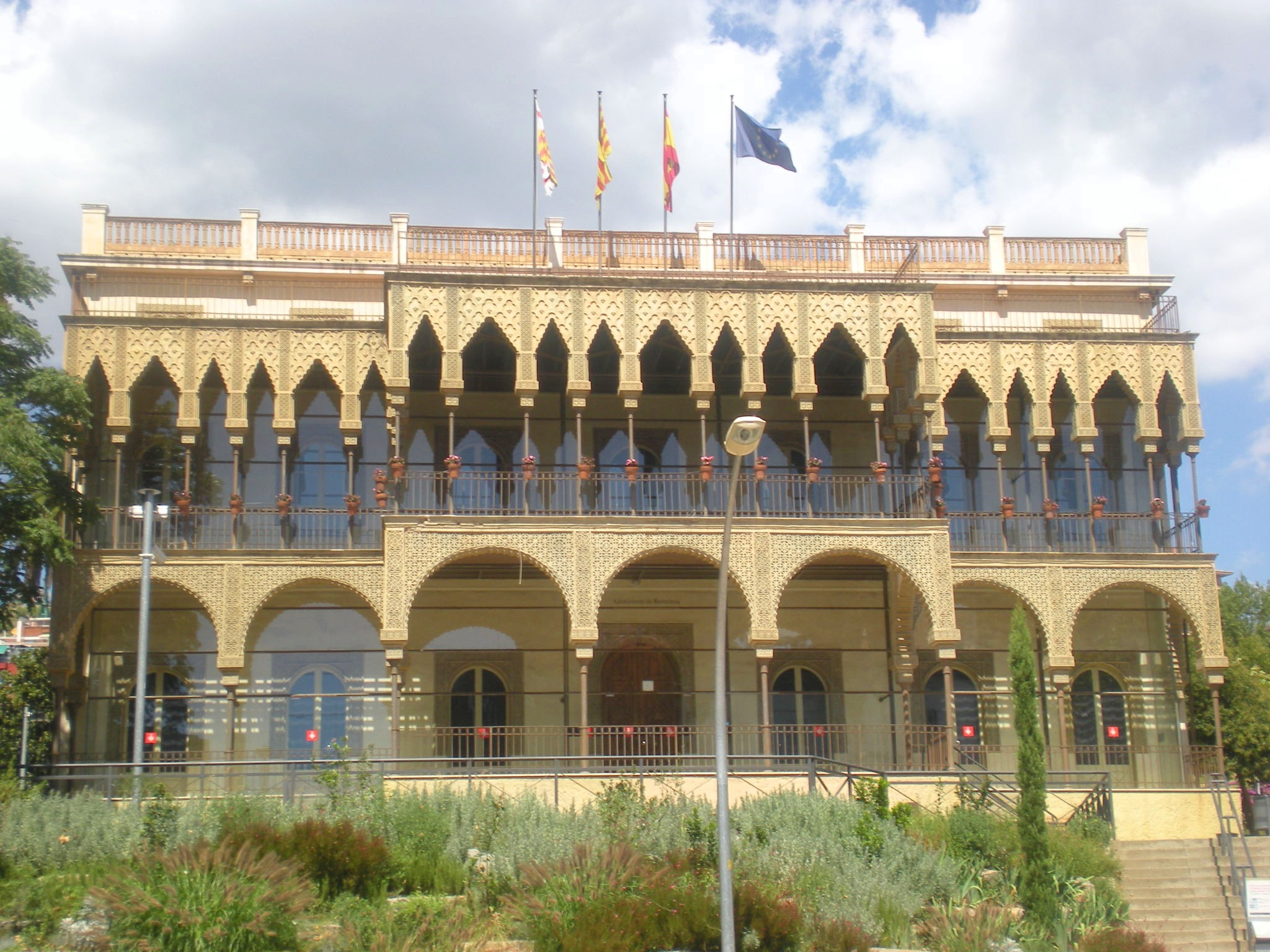 Casa de les Altures, Horta-Guinardó, Barcelona